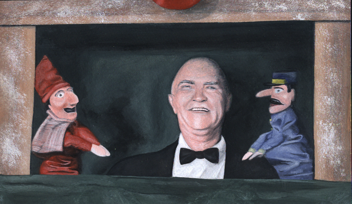 Gouache (schilderij) gemaakt door kunstschilder Jan Maliepaard van Chris van Abkoude